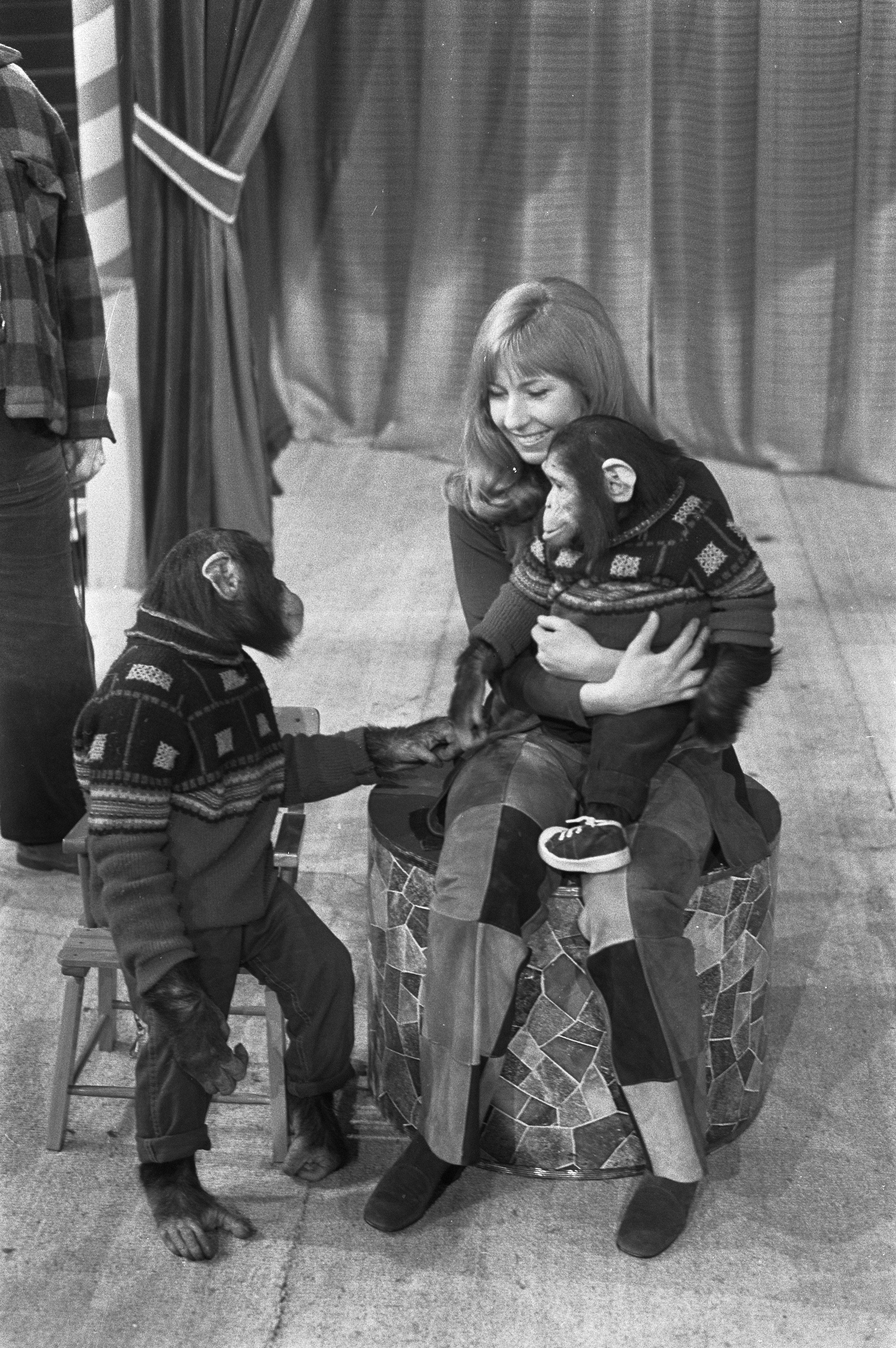 Collectie / Archief : Fotocollectie Anefo Reportage / Serie : [ onbekend ] Beschrijving : Artiesten treden op met circusnummers in Nationaal Songfestival in Carré, Amsterdam; tijdens repetitie Willeke Alberti met apen Datum : 15 februari 1972 Locatie : Amsterdam, Noord-Holland Trefwoorden : ARTIESTEN, circussen Persoonsnaam : Alberti, Willeke Instellingsnaam : Nationaal Songfestival Fotograaf : Verhoeff, Bert / Anefo, [onbekend] Auteursrechthebbende : Nationaal Archief Materiaalsoort : Negatief (zwart/wit) Nummer archiefinventaris : bekijk toegang 2.24.01.05 Bestanddeelnummer : 925-3866